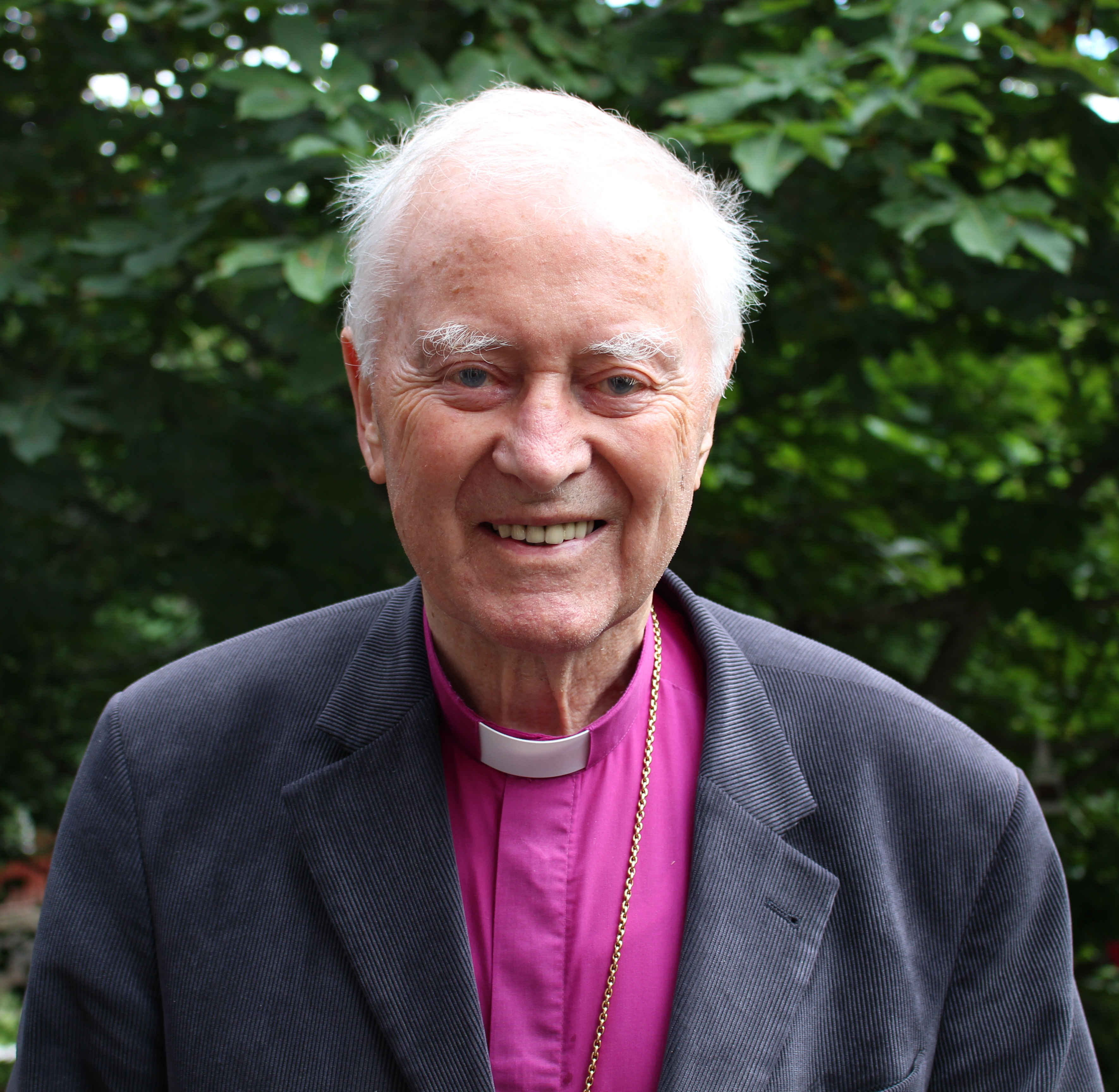 Ärkebiskop Gunnar Weman.